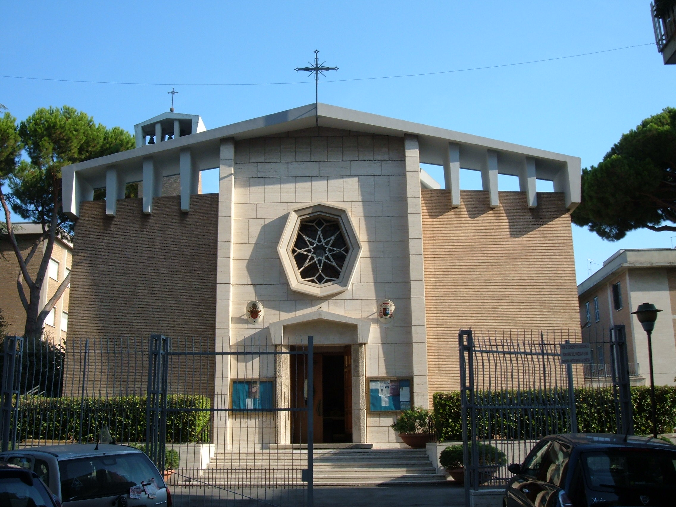 Chiesa di Santa Maria Immacolata di Lourdes, a Roma, nel quartiere Aurelio (via di Santa Bernadette).